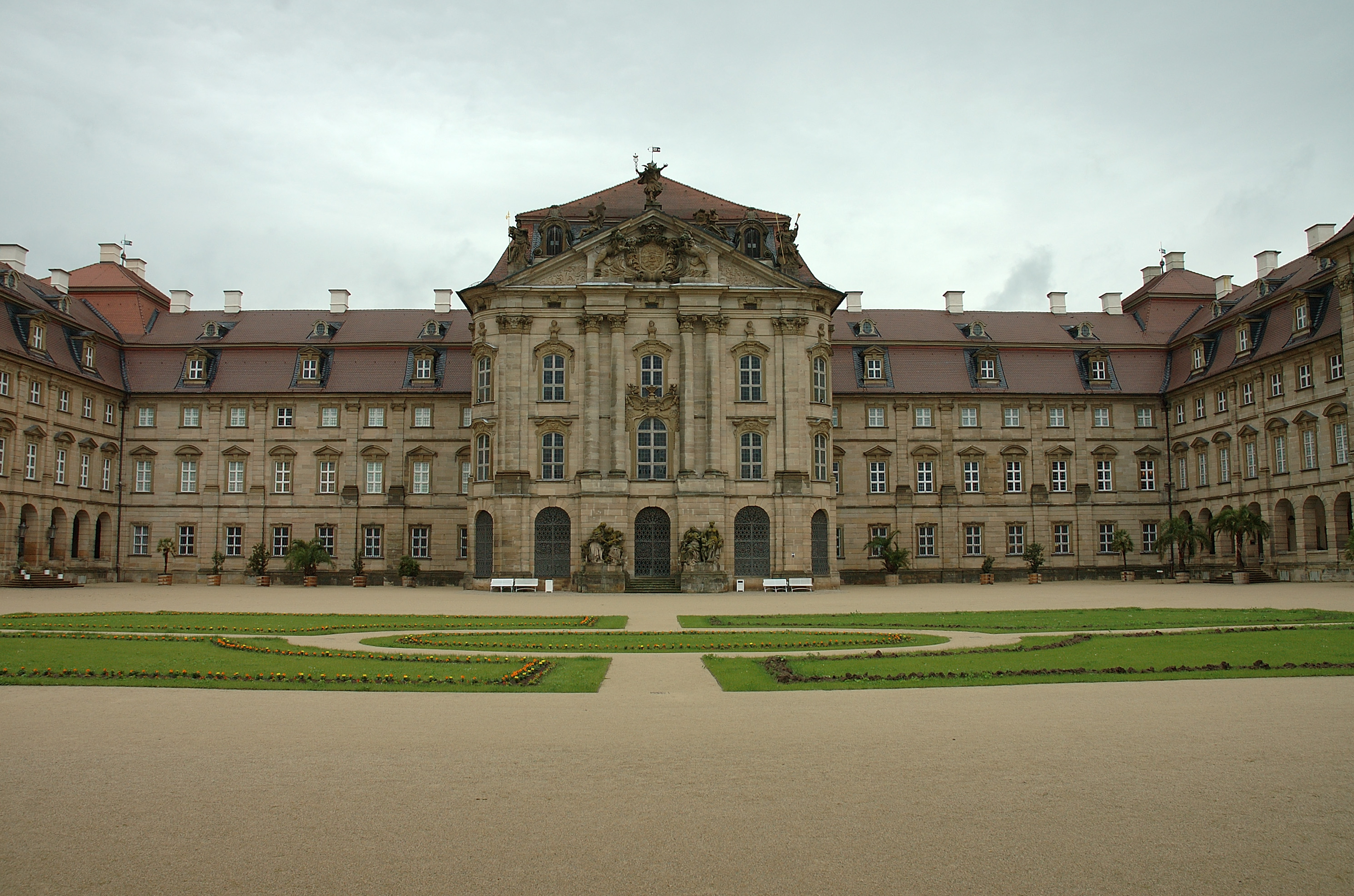 Schloß Weissenstein bei Bamberg